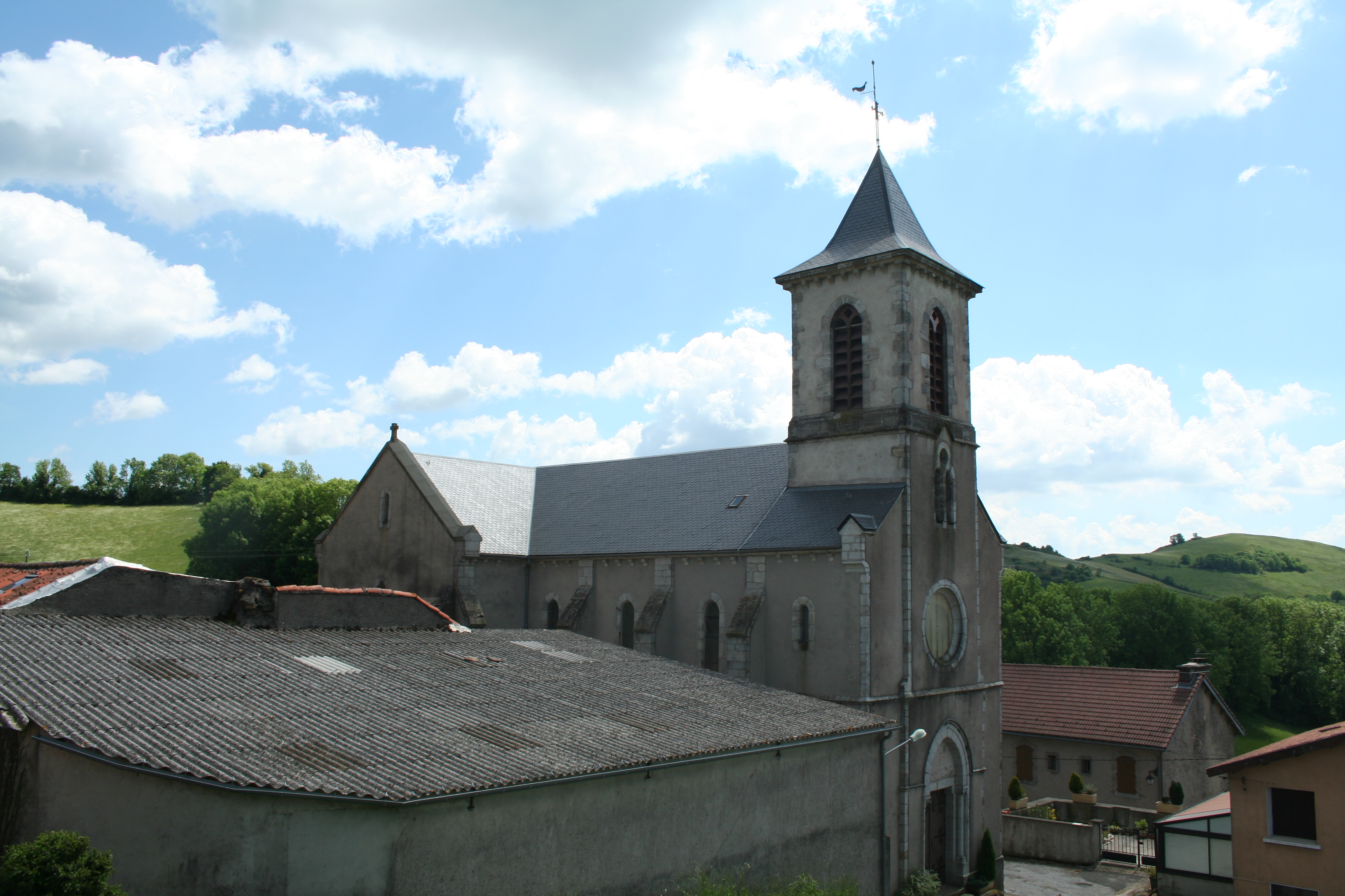 Montagnol (Aveyron) - église Saint-Martin.